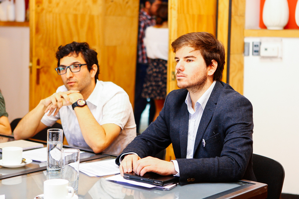 Giorgio Jackson entrega su adhesión a Michelle Bachelet en segunda vuelta presidencial.